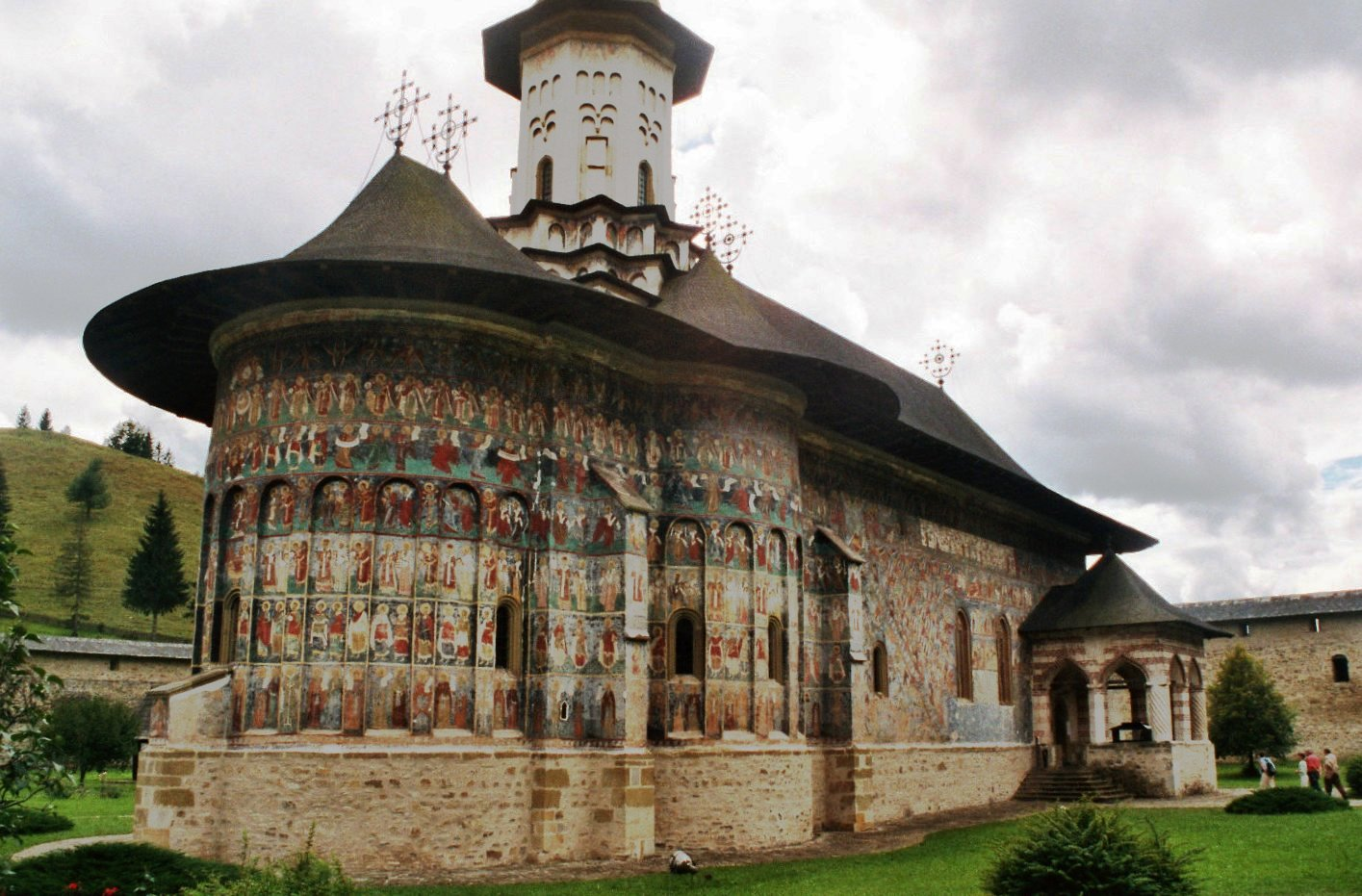 Suceviţa klooster Roemenië 11